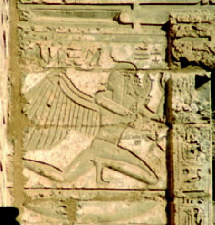 Ramses III.-Darstellung als Rechit am Migdol-Tor in Medinet-Habu